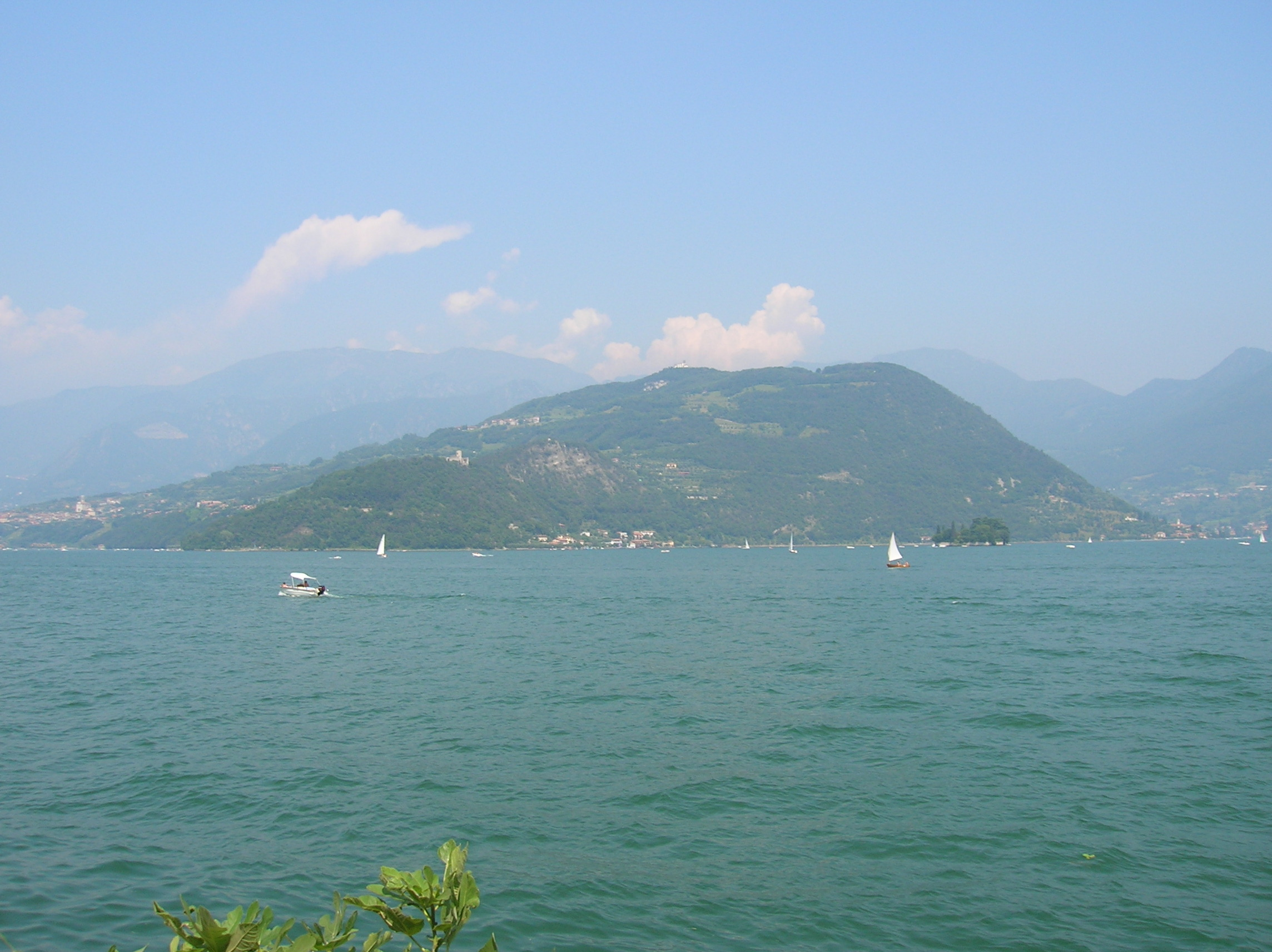 Monte Isola, von der Sebina Occidentale aus fotografiert (selbst fotografiert)